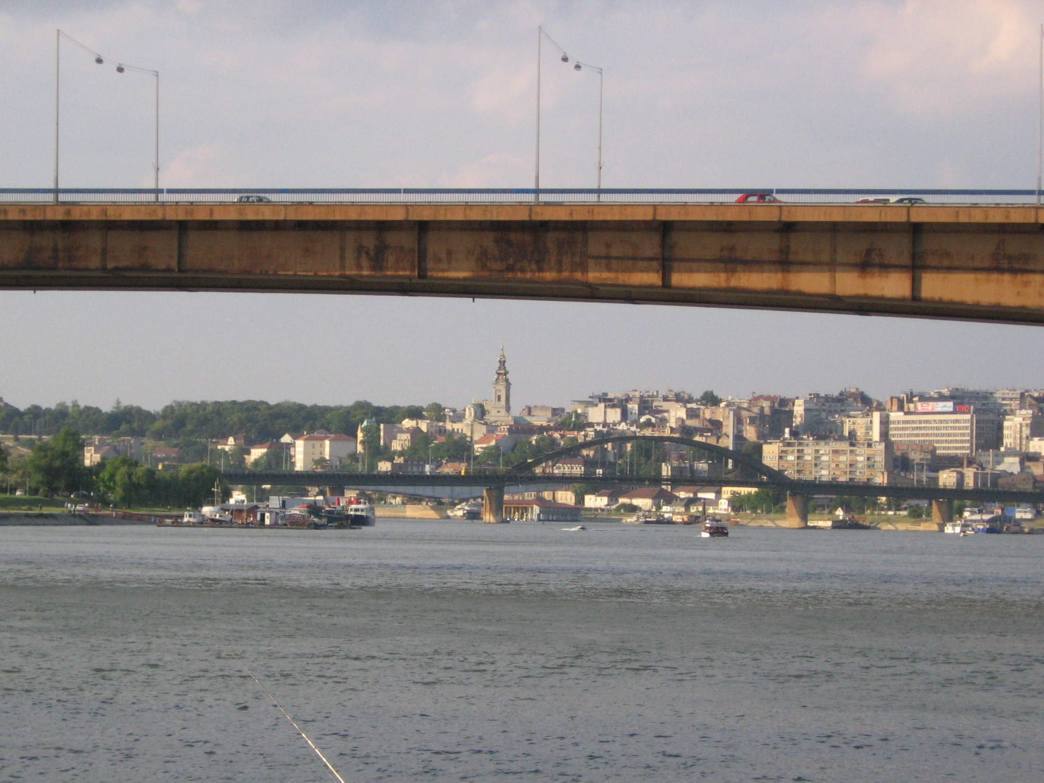 Au premier plan se trouve le pont de Gazela, un axe important de la circulation automobile à Belgrade